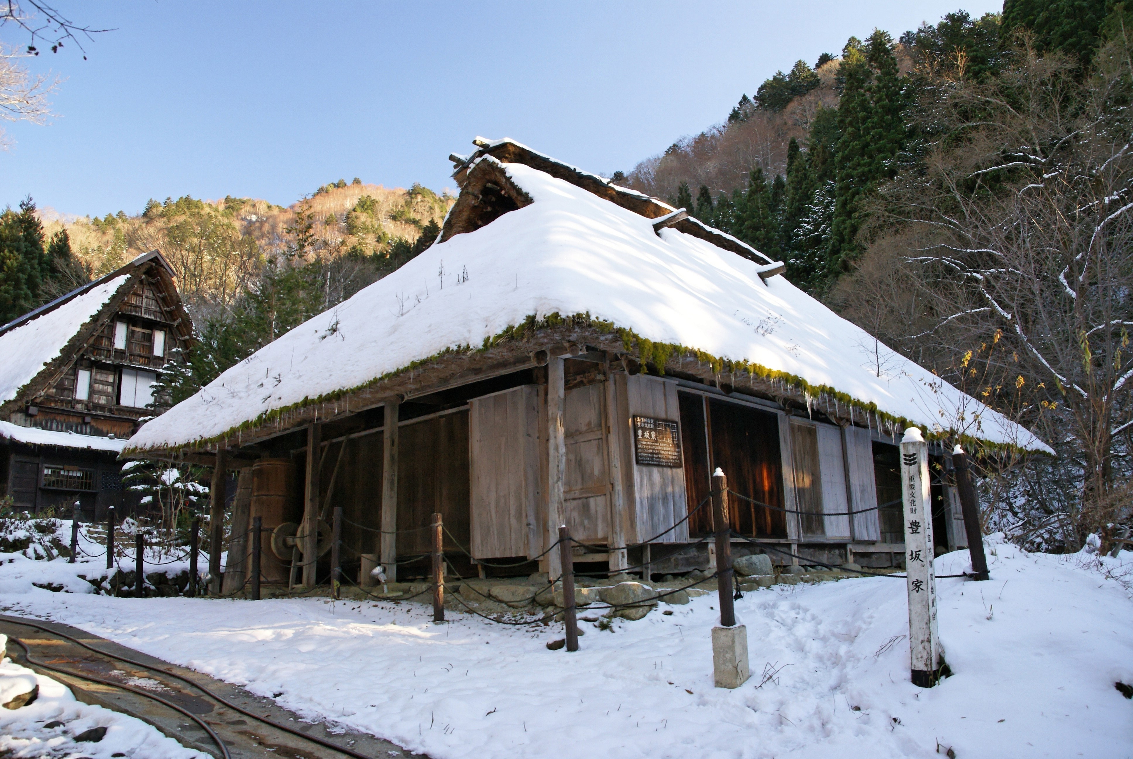 Hirayu Minzokukan in Takayama, Gifu prefecture, Japan